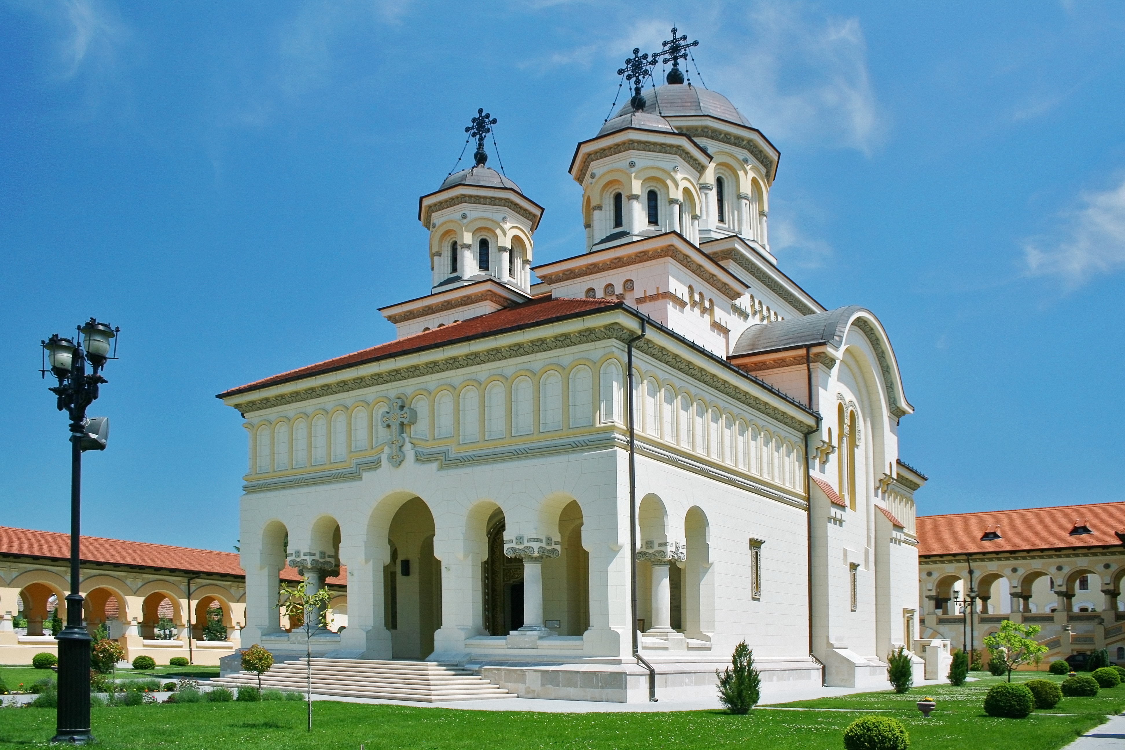 Catedrala Încoronării din Alba Iulia. 01